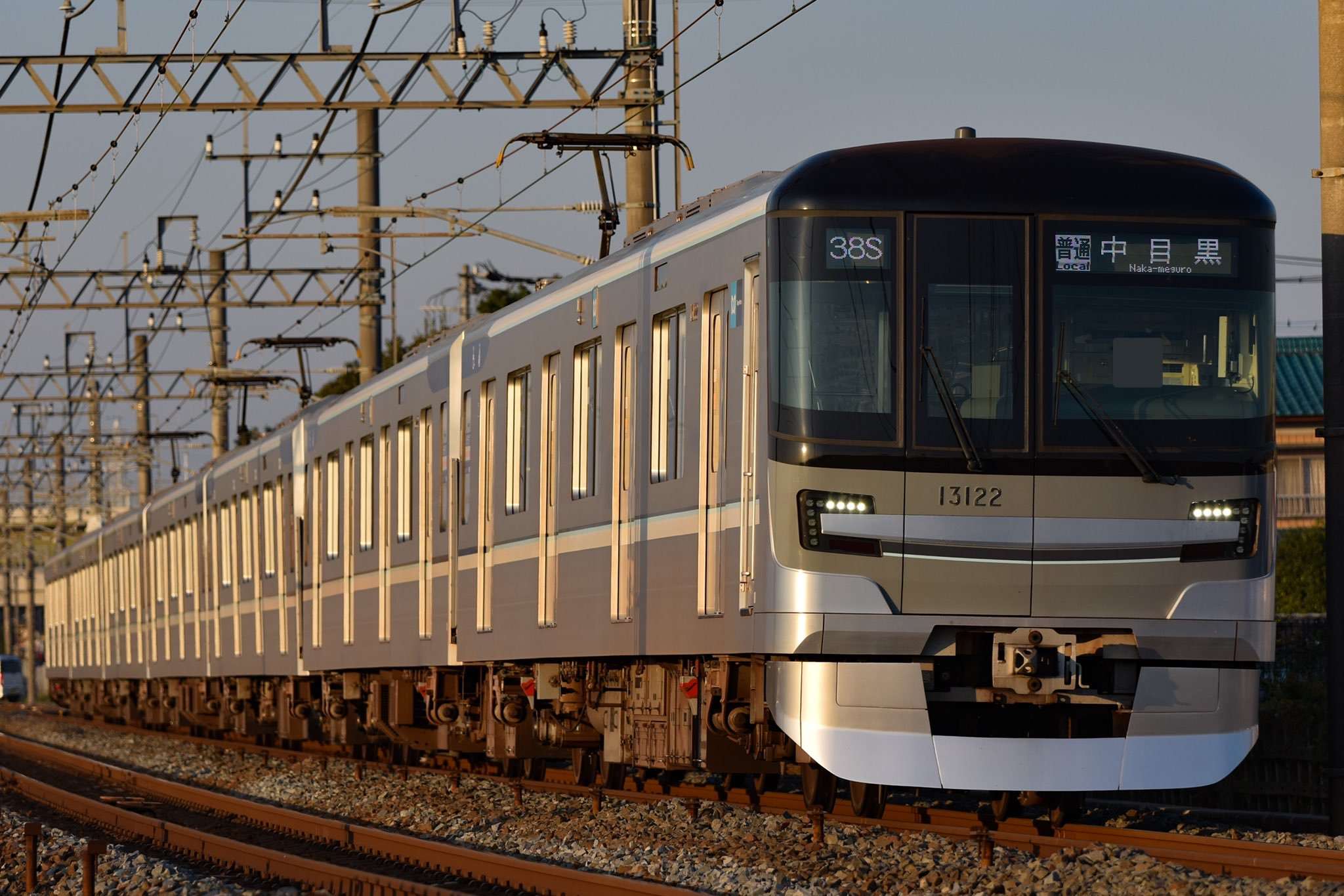 東京メトロ13000系13122編成 普通中目黒行き